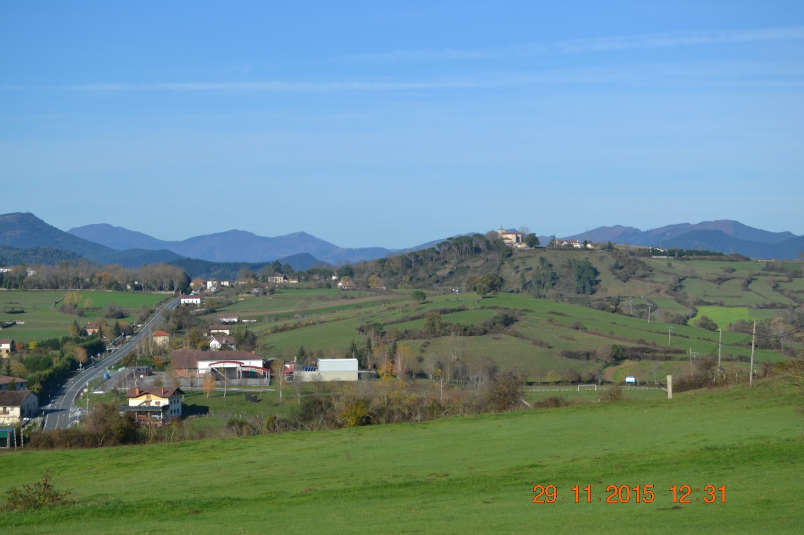 Menagarai desde Arespalditza